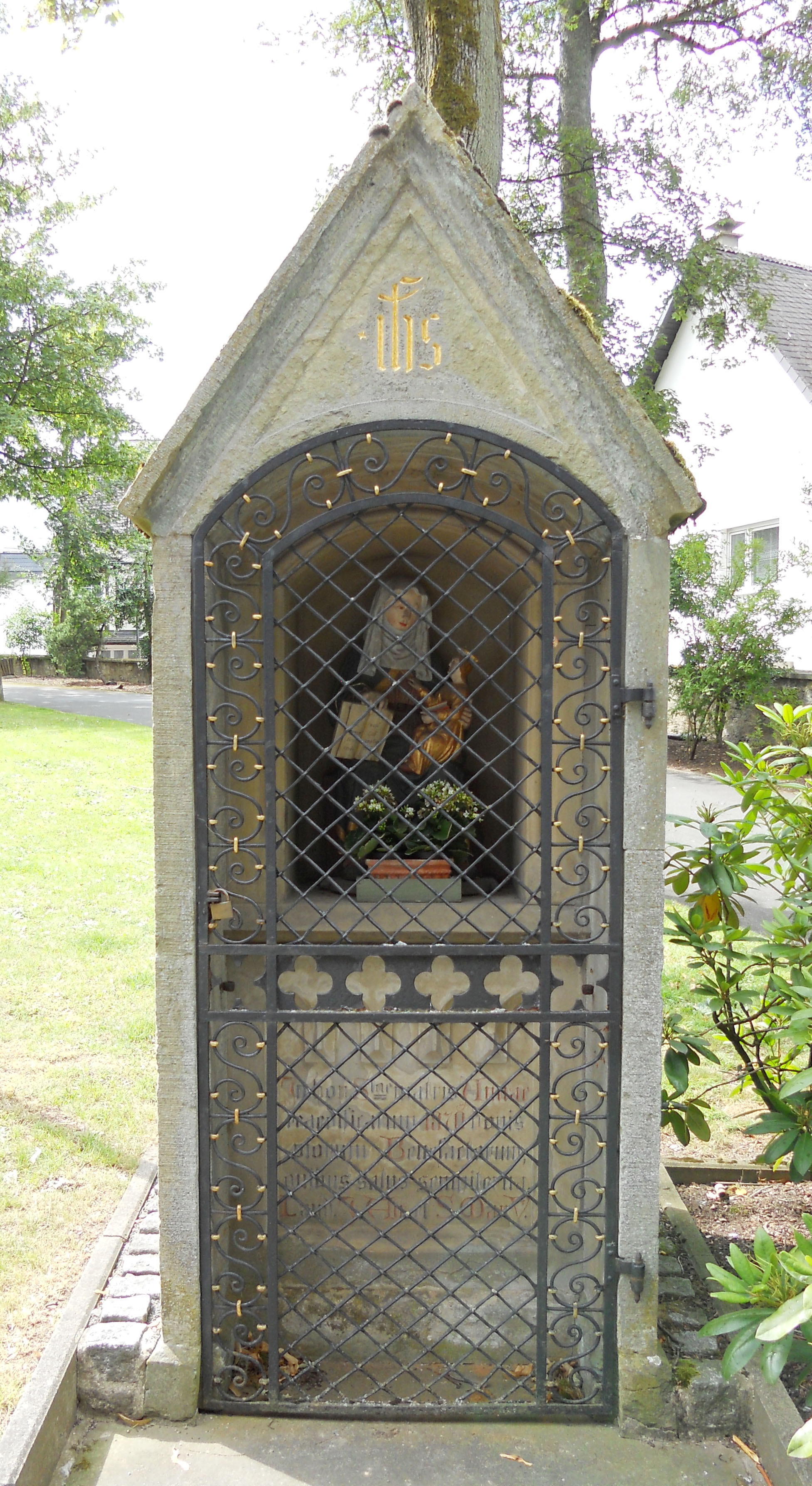 Propsteikirche Heiligenhäuschen This image shows a heritage building in Germany, located in the North Rhine-Westphalian city Brilon.